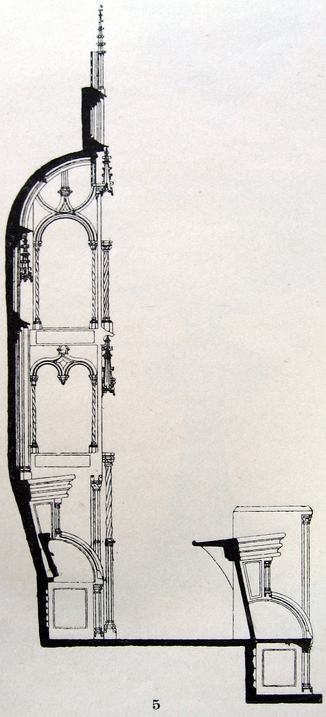 Cappenberg, Kirche, katholisch, romanisch, 12. Jahrhundert, Chorstuhl, Querschnitt nach Nagel „Dreischiffige (dreijochige) Pfeilerbasilika mit Querschiff und zweijochigem Chor mit gothischem 5/8 Schluß. Ohne Thurm. Einfaches Glockenhaus neben der Nordseite der KKirche. Treppenthurm an der Nordseite des Chors, neu. Ursprünglich flach gedeckt; zu gothischer Zeit mit (verankerten) Kreuzgewölben versehen; im mittleren Joche des Mittelschiffs ein Sterngewölbe. Strebepfeiler vereinzelt.Die rundbogigen Fenster theilweise spitzbogig verbreitert; letztere dreitheilig mit Maßwerk. Drei Eingänge: an der Westseite, an der Nordseite des nördlichen und an der Ostseite des südlichen Querschiffs, ohne Schmuck. An der Ostseite des nördlichen Querschiffs nach außen vortretende Nische (Rest einer halbkreisförmigen Apsis).“